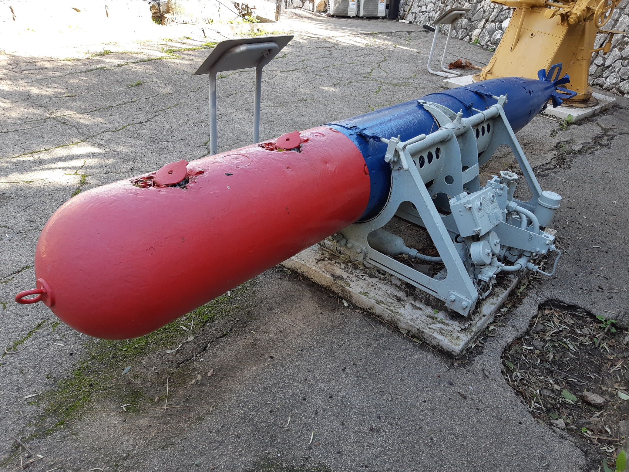 טורפדו על מטיל בשימוש טרפדות ישראליות